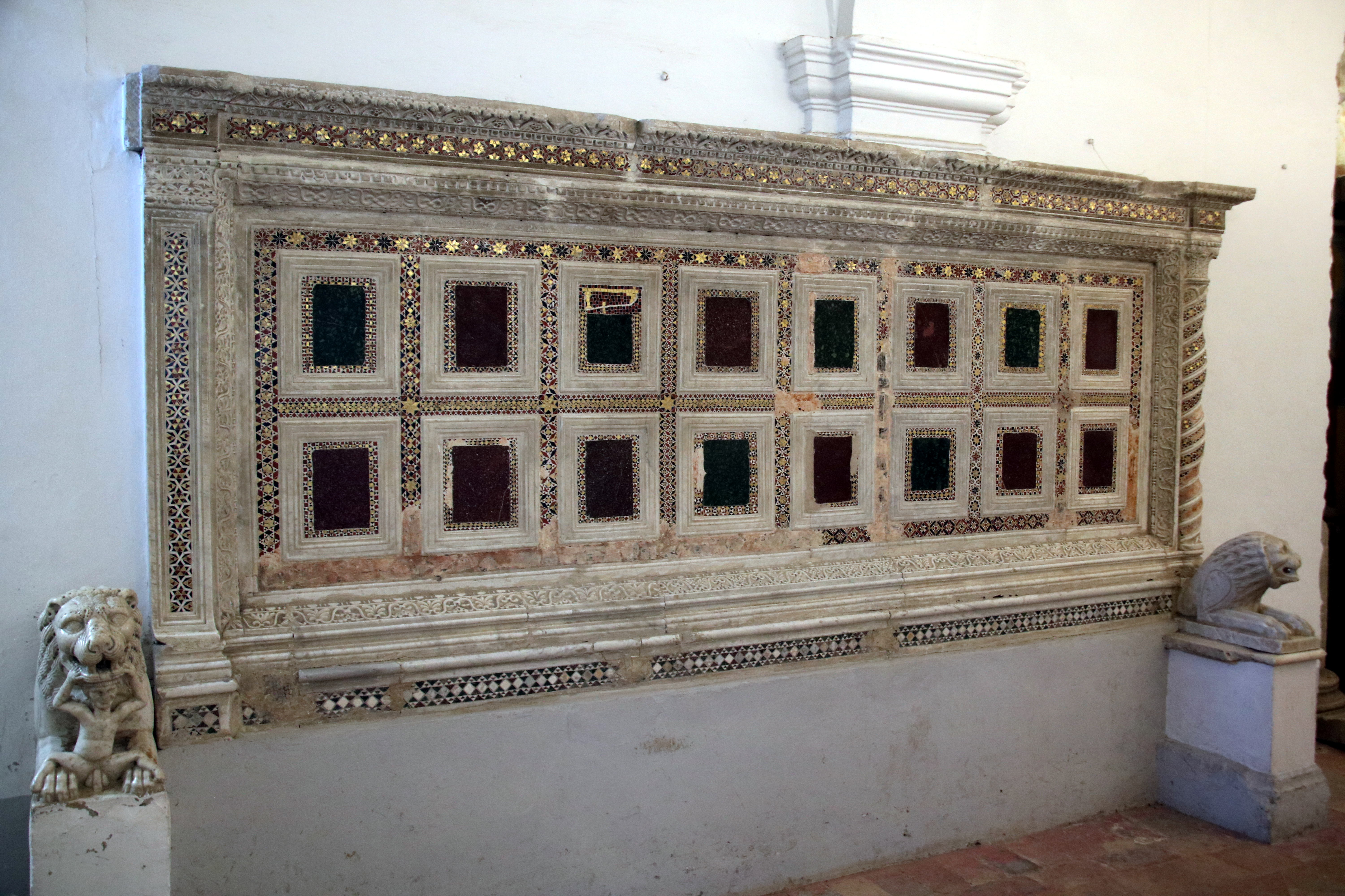 Cattedrale di Santa Maria Maggiore (Civita Castellana), pluteo marmoreo